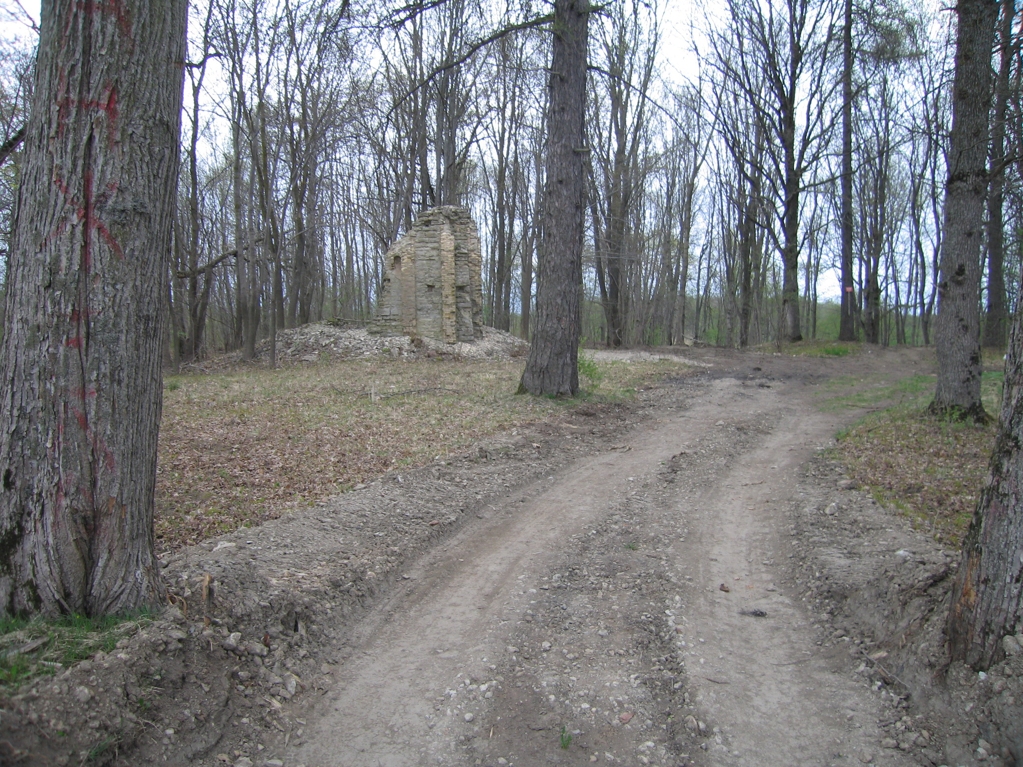 Vaade kalmistule, taga on kabeli varemed